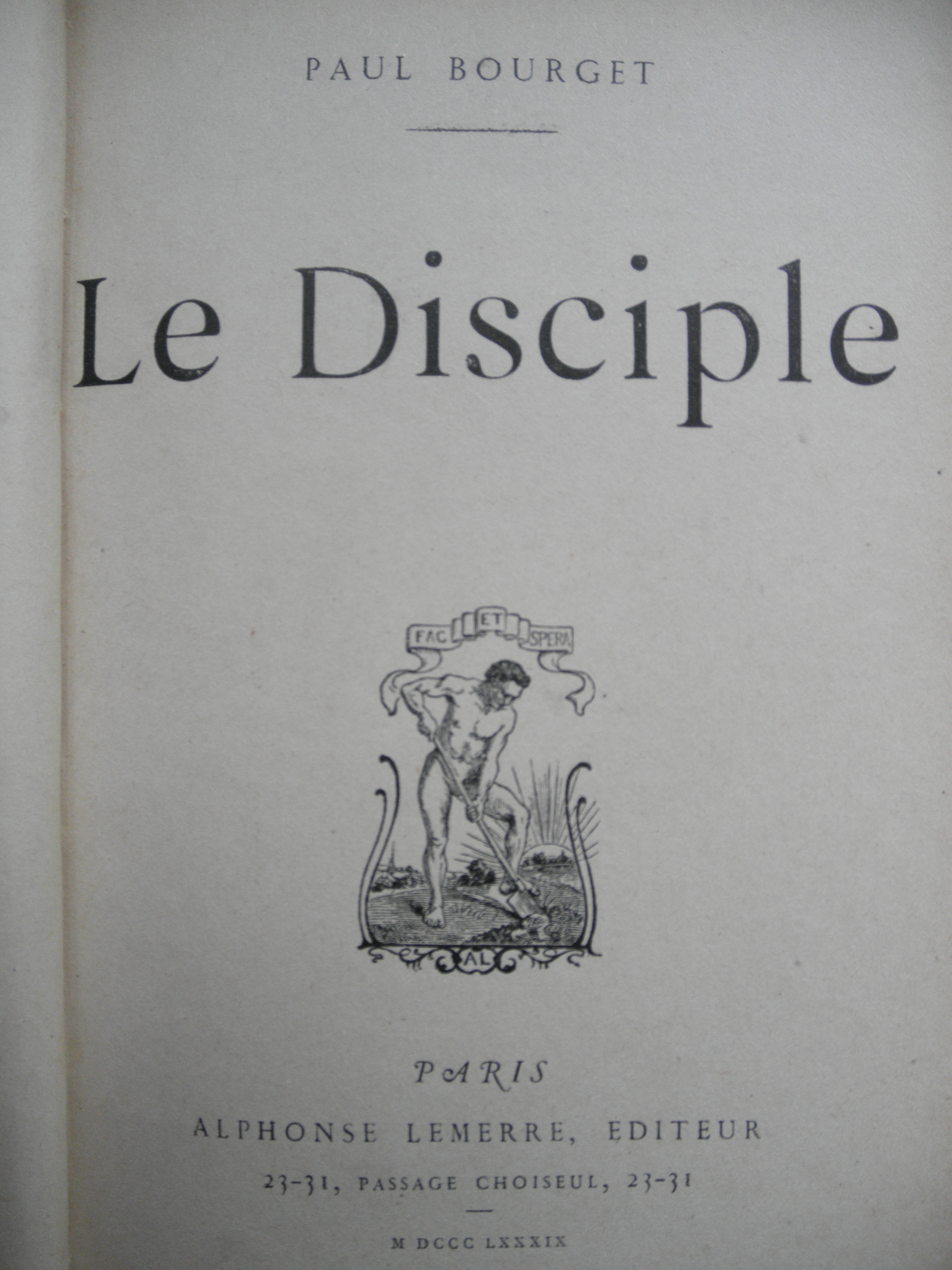 Roman Le Disciple